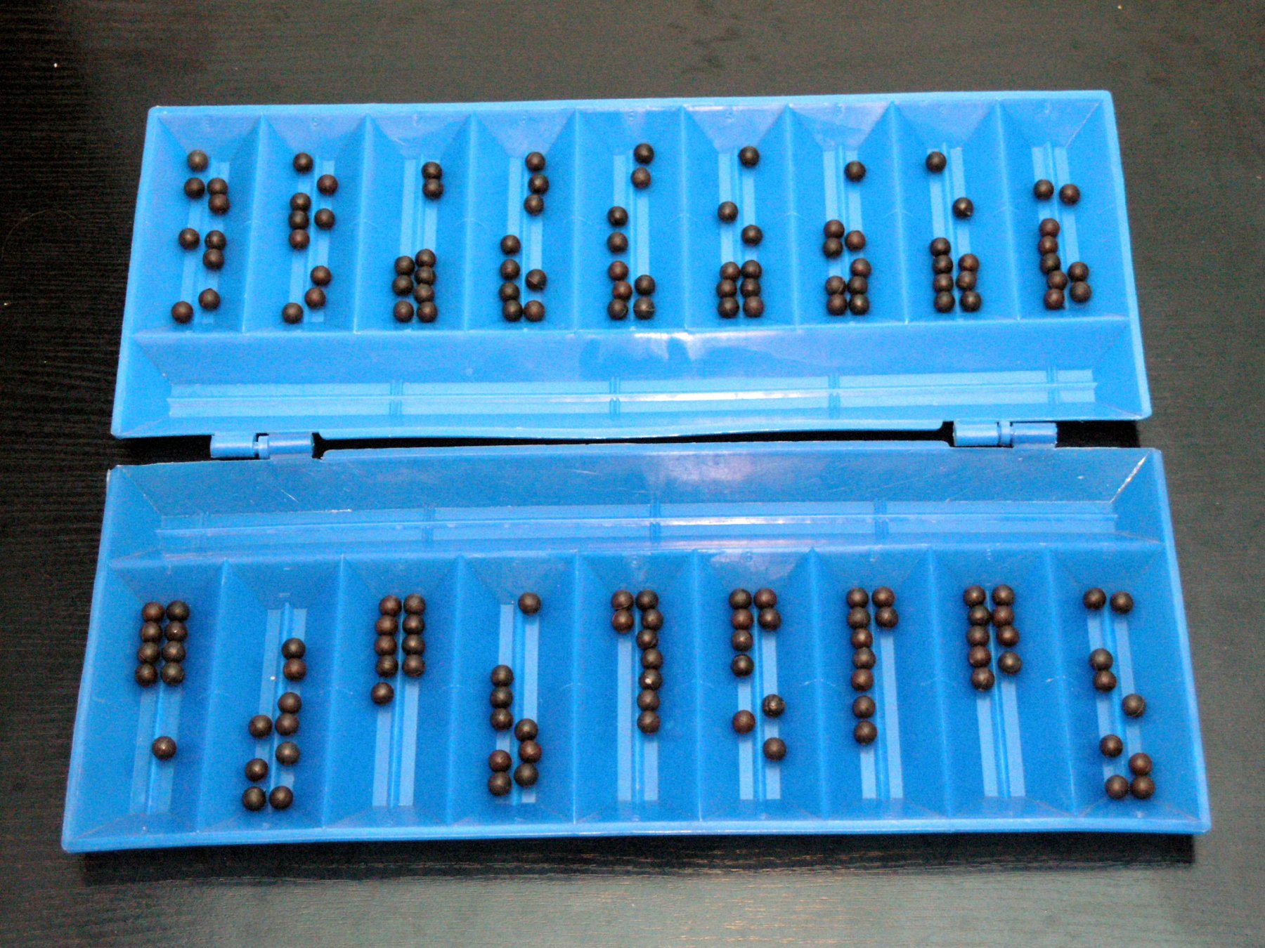 Toguz kumalak / Dokuz Kumalak